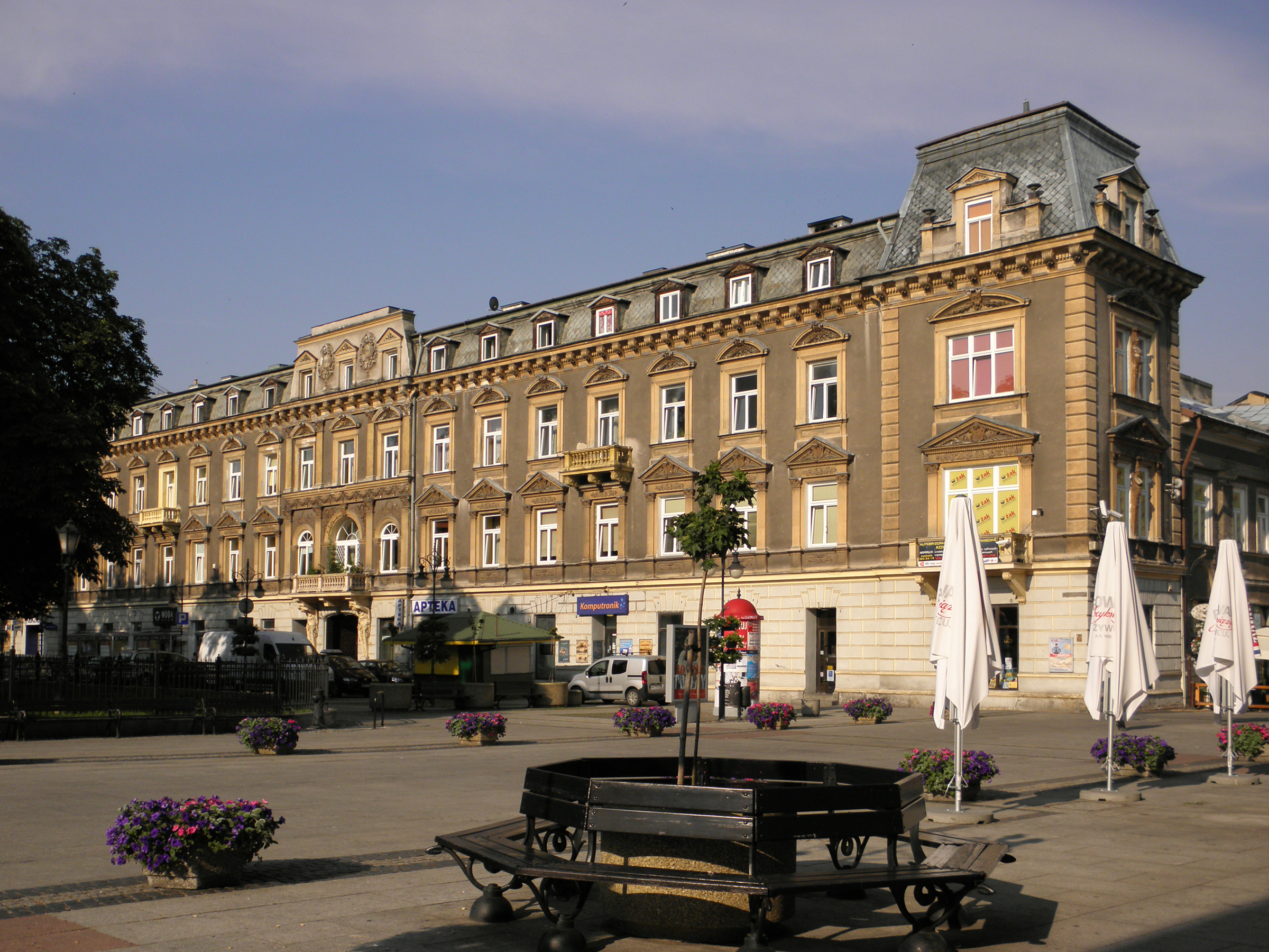 Radom - dawny pałac Karschów.